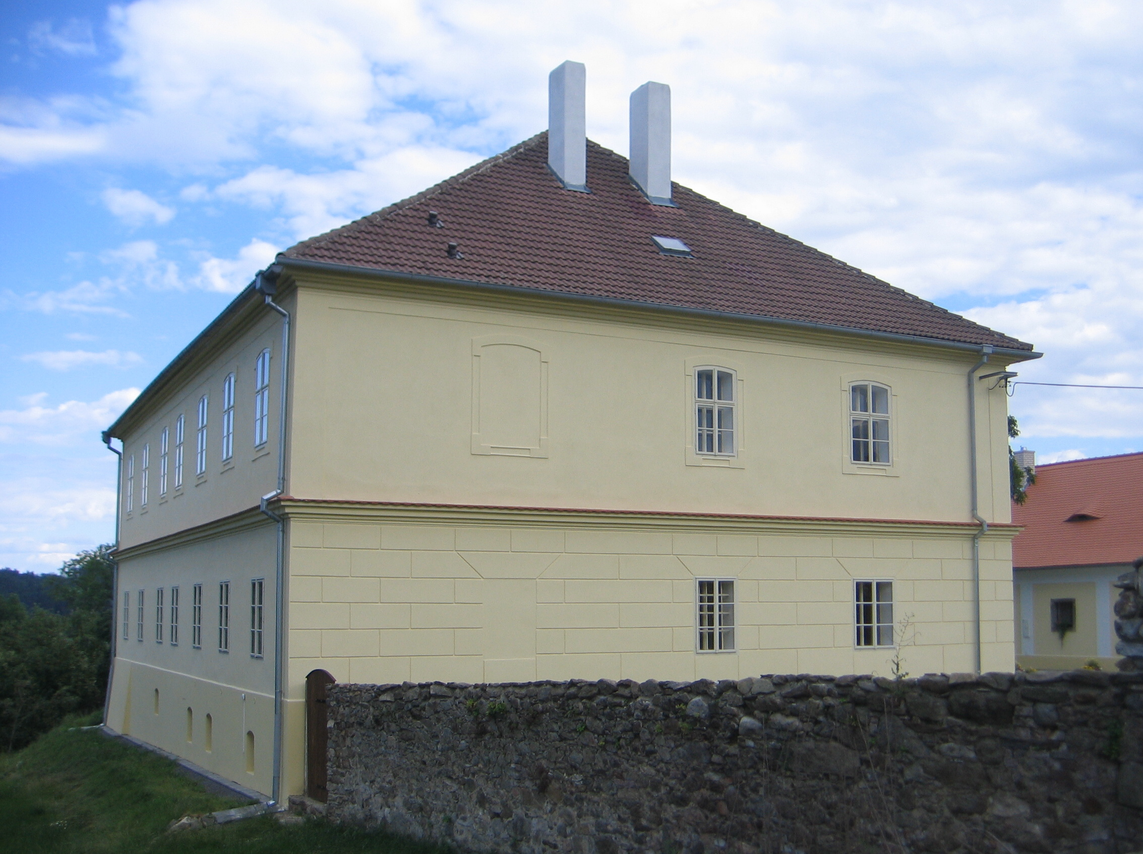 Bukovník (okr. Klatovy), čp. 1 fara od západu. Foceno ze hřbitovního areálu.